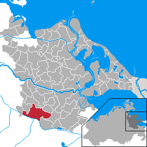 Spantekow, Landkreis Ostvorpommern, Mecklenburg-Vorpommern